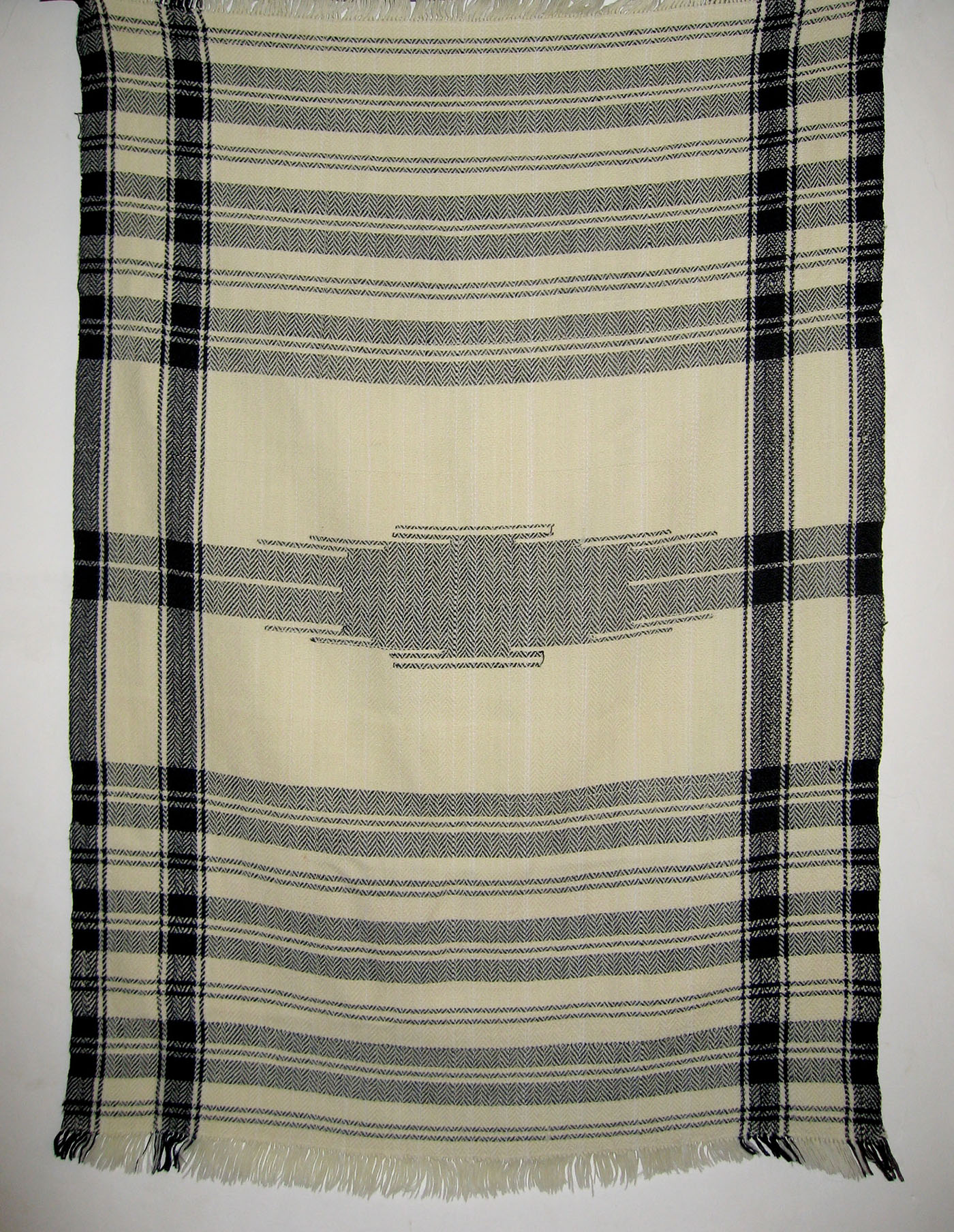 کوردی: بەرماڵی کوردی